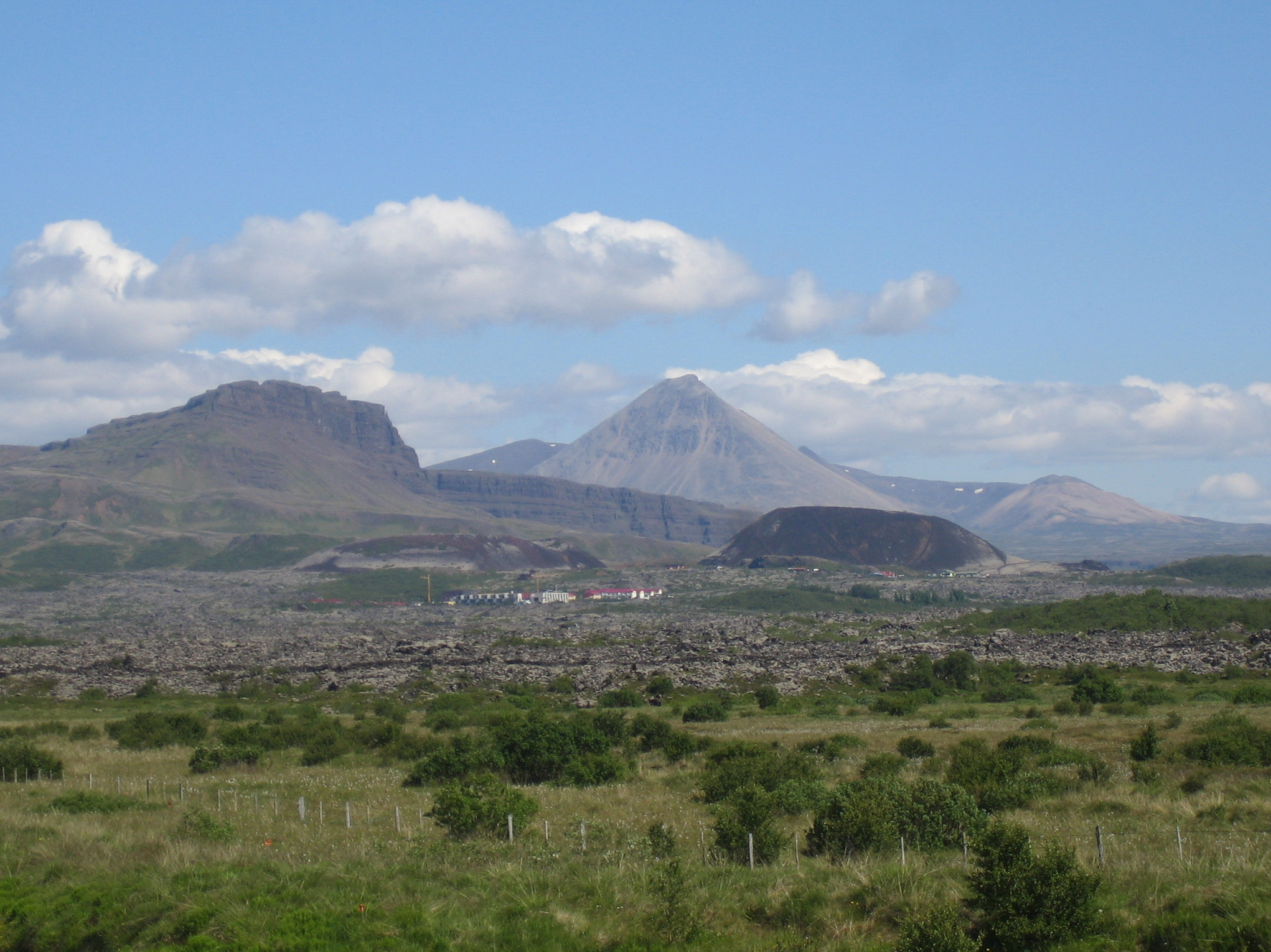 Baula í Borgarfirði